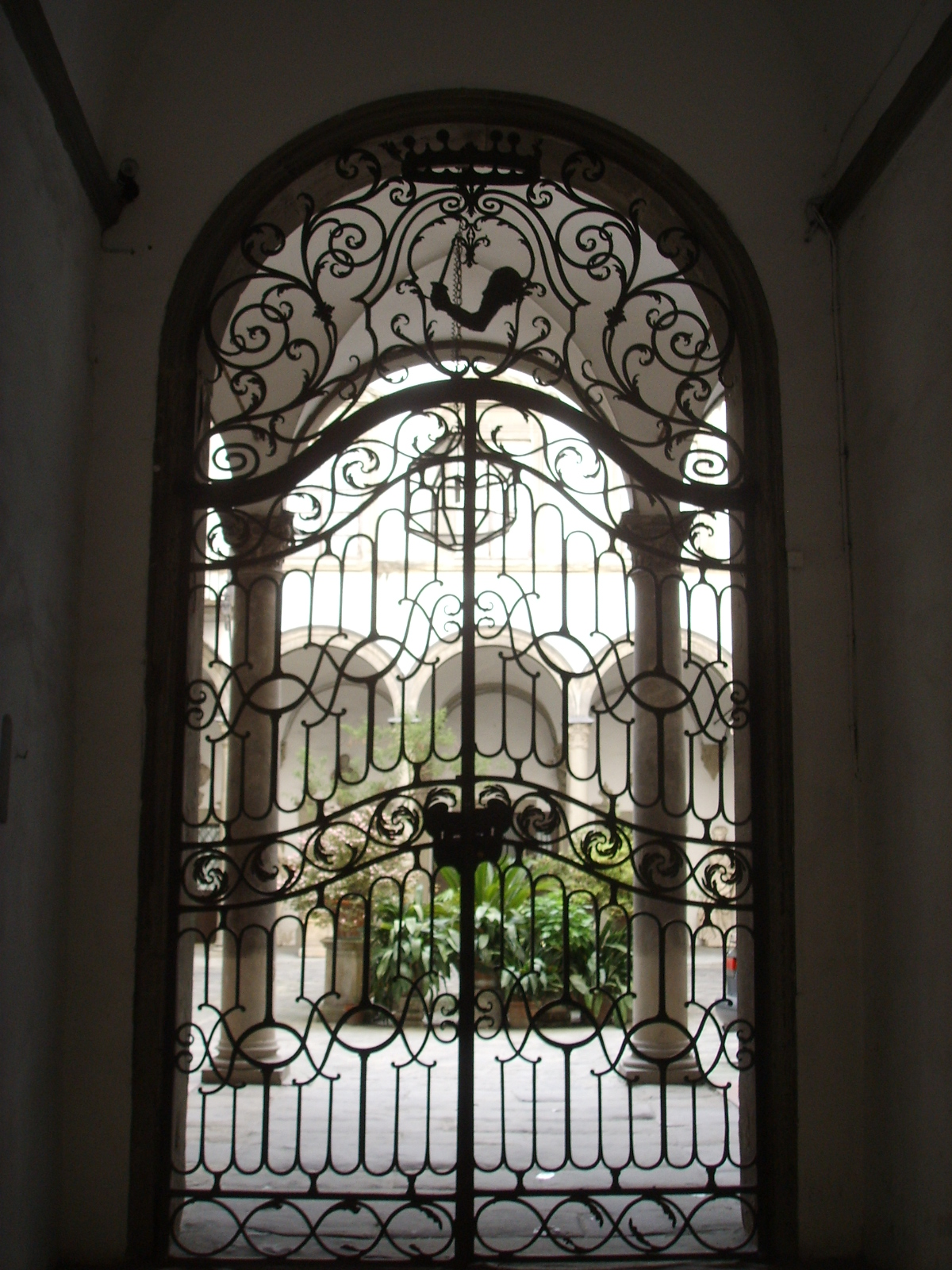 Palazzo Del Pugliese, cancellata